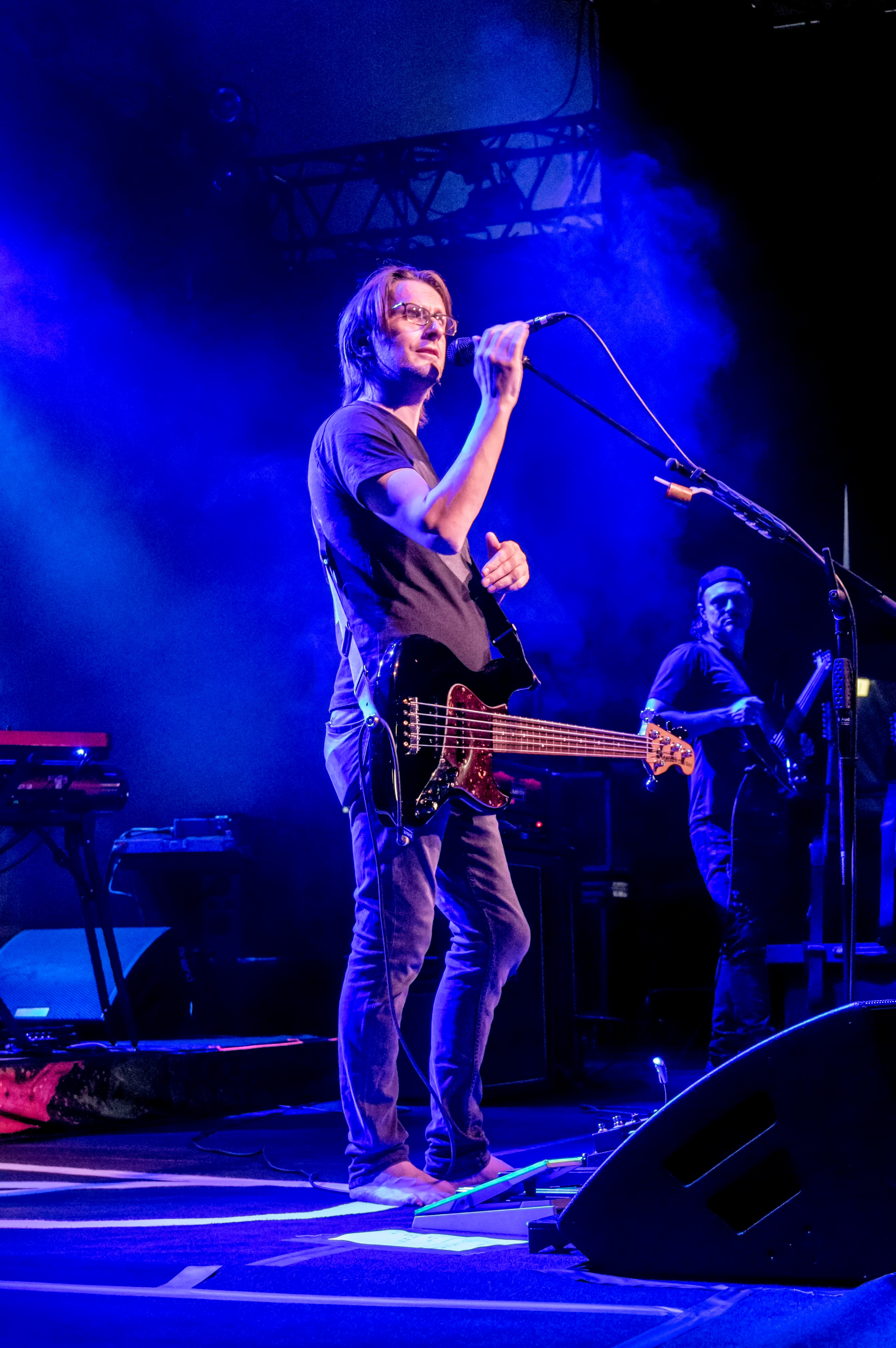 Bilder vom Zelt Musik Festival 2018 in Freiburg im Breisgau Das Eröffnungskonzert mit Steven Wilson